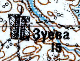 Топографическая карта Ленинградской области, квадрат VIc-28 (Луга), деревня Зуево